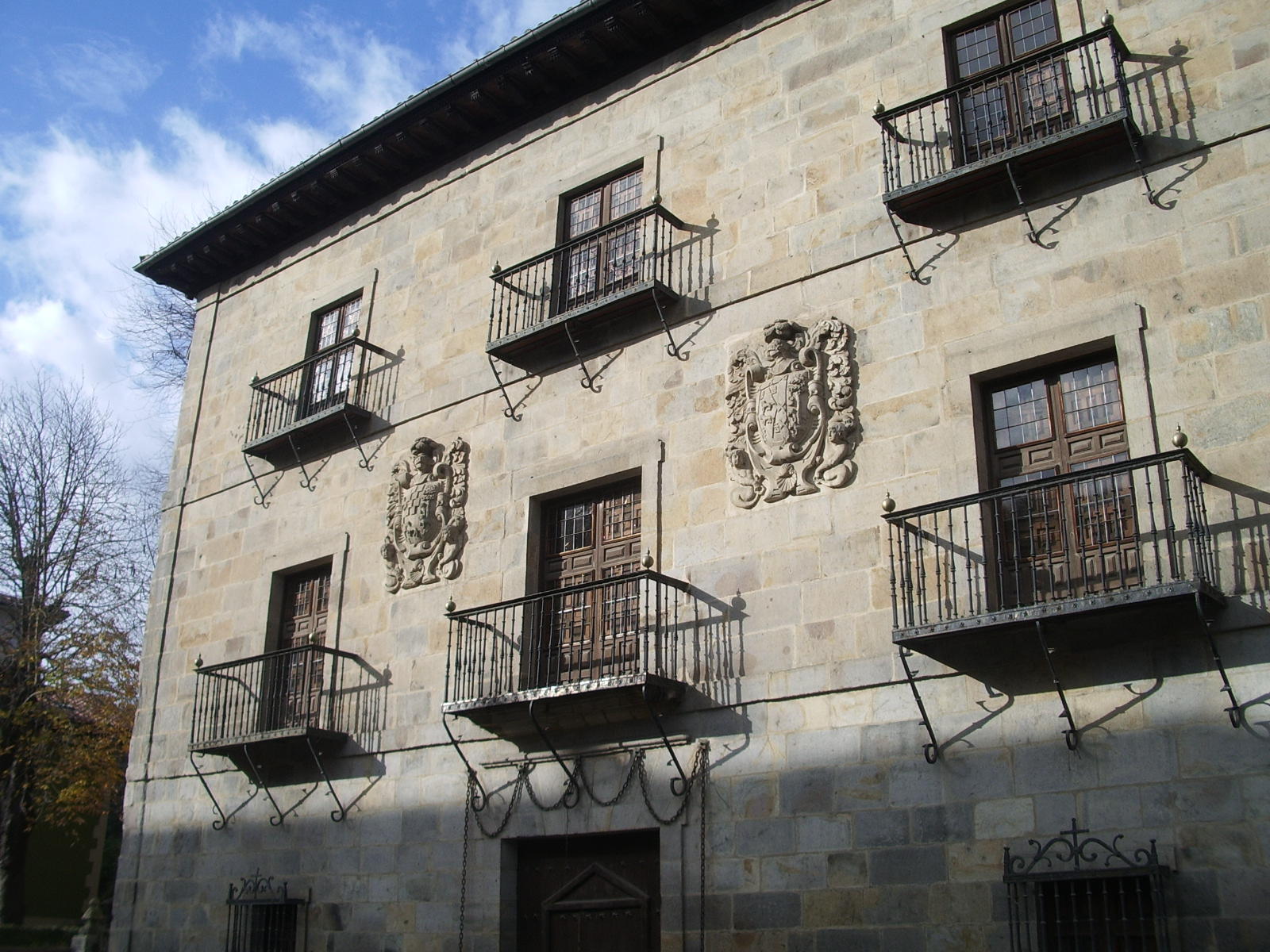 Monterron jauregia, Arrasate, Gipuzkoa